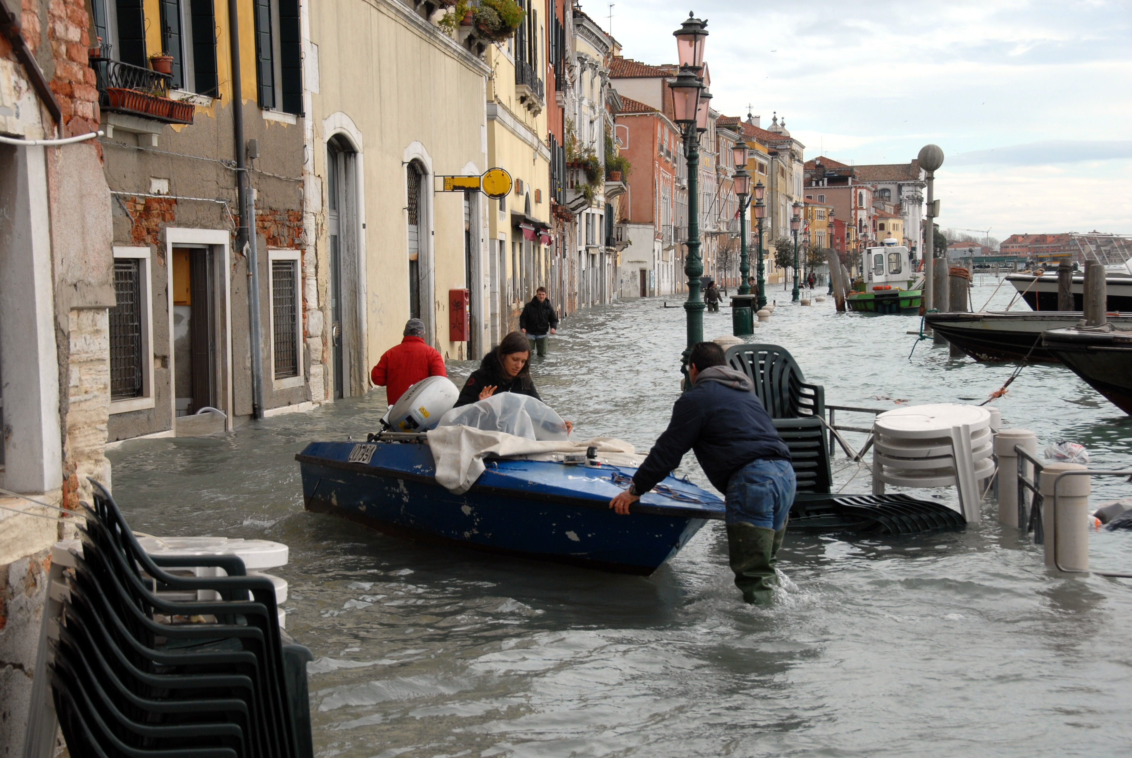 Acqua alta Fondamenta delle Zattere Venezia